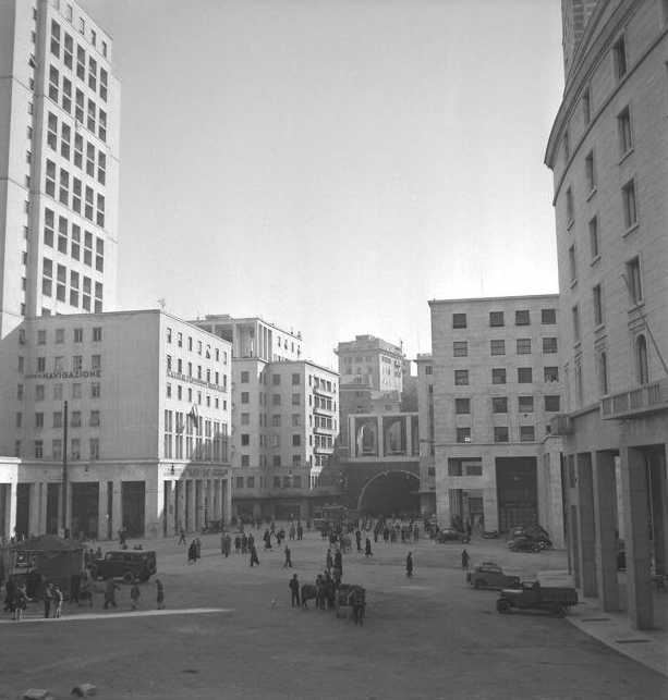 Genova, grattacieli in piazza Dante, negli anni quaranta, dove sorgeva l'antico crocicchio di Ponticello (Ponteixello).